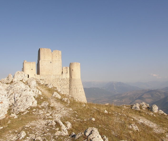 Rocca Calascio